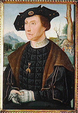 Portrait of Jan van Wassenaer